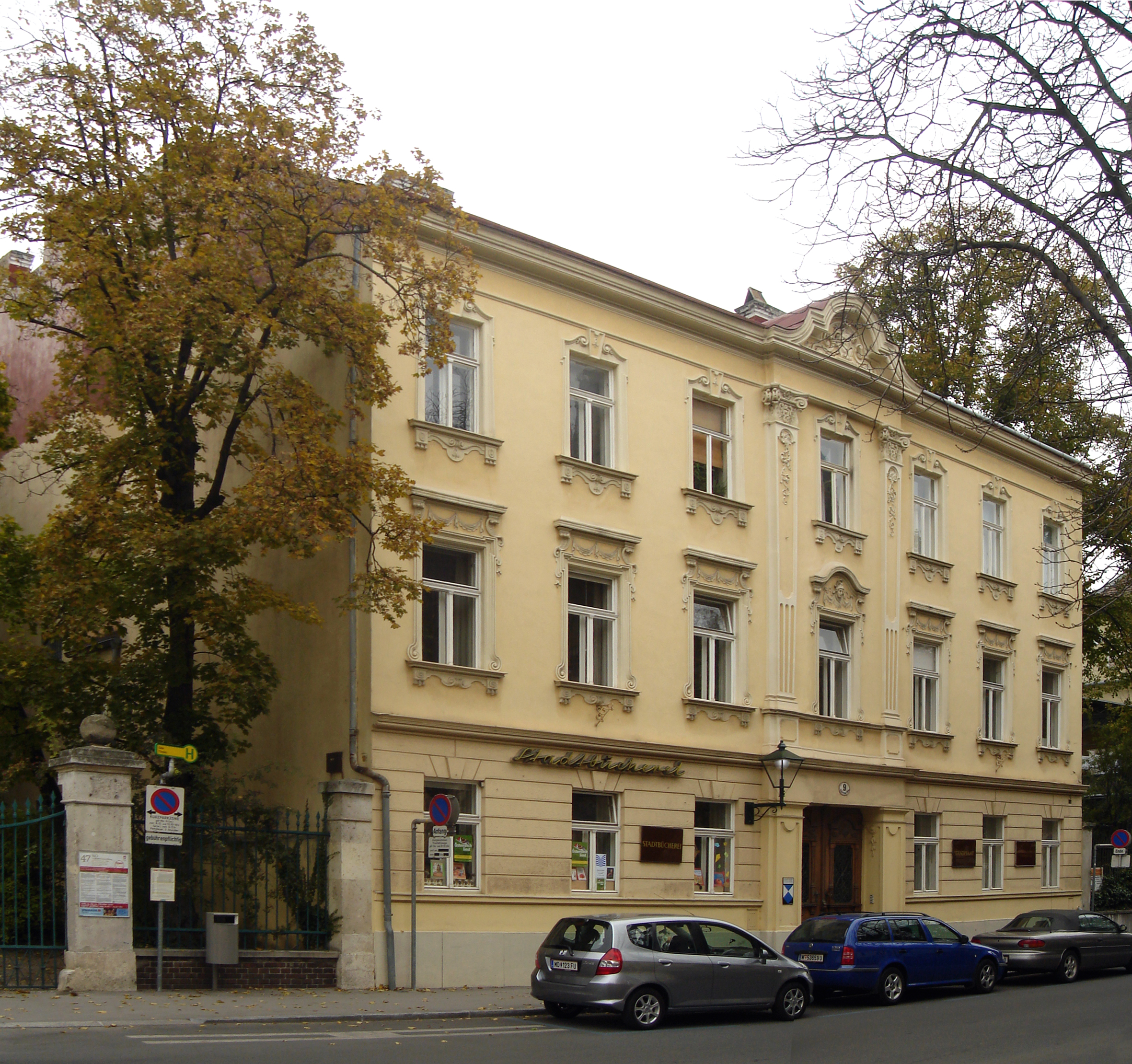 Baden bei Wien, Kaiser-Franz-Ring 9, Zellerhof, Standesamt, Stadtbücherei.